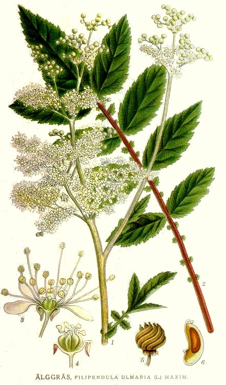 Filipendula ulmaria (L.) Maxim Original Description Älggräs, Filipendula ulmaria (L.) Maxim